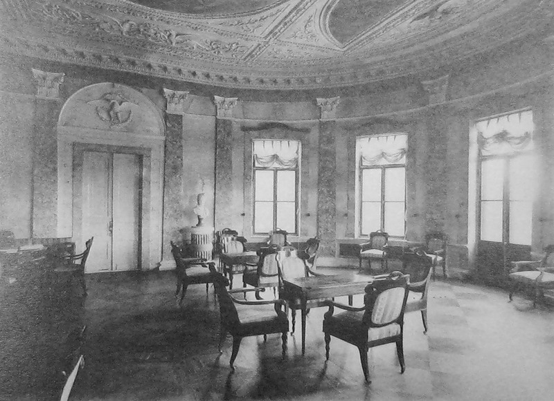 Panin Palace in Dugino